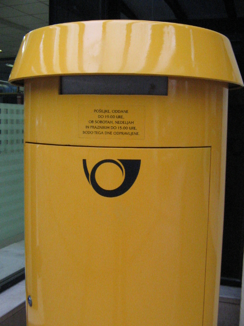 Slovenski (SLO) poštni nabiralnik. Fotografiral Janez Novak, Ljubljana, Slovenija, 2006-05-30